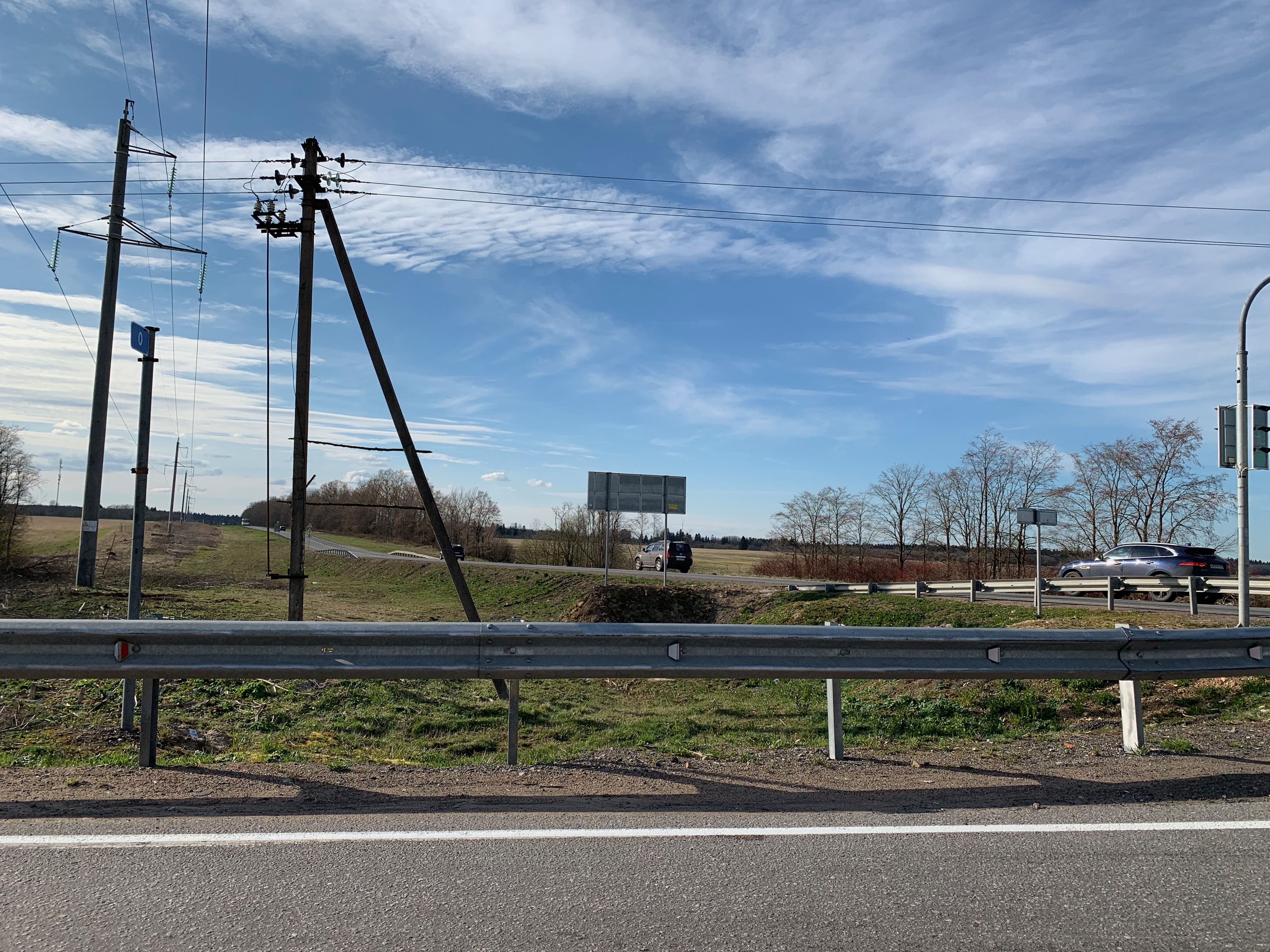 Дорога А120